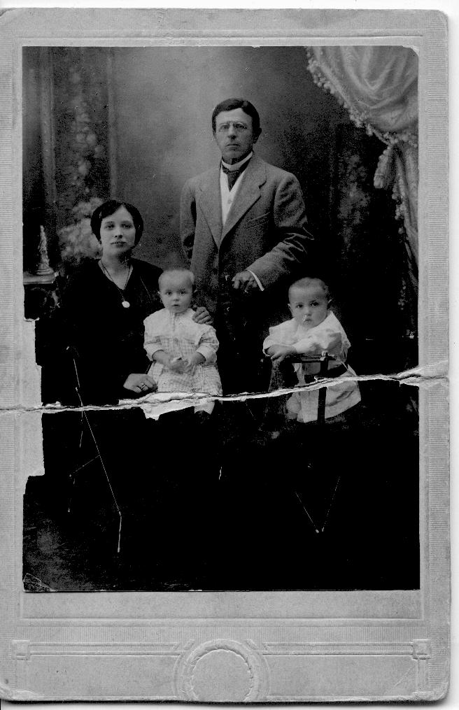 Потомственный дворянин Киевской губернии Левковский Болеслав Антонович с семьей. Фото 1915 года.